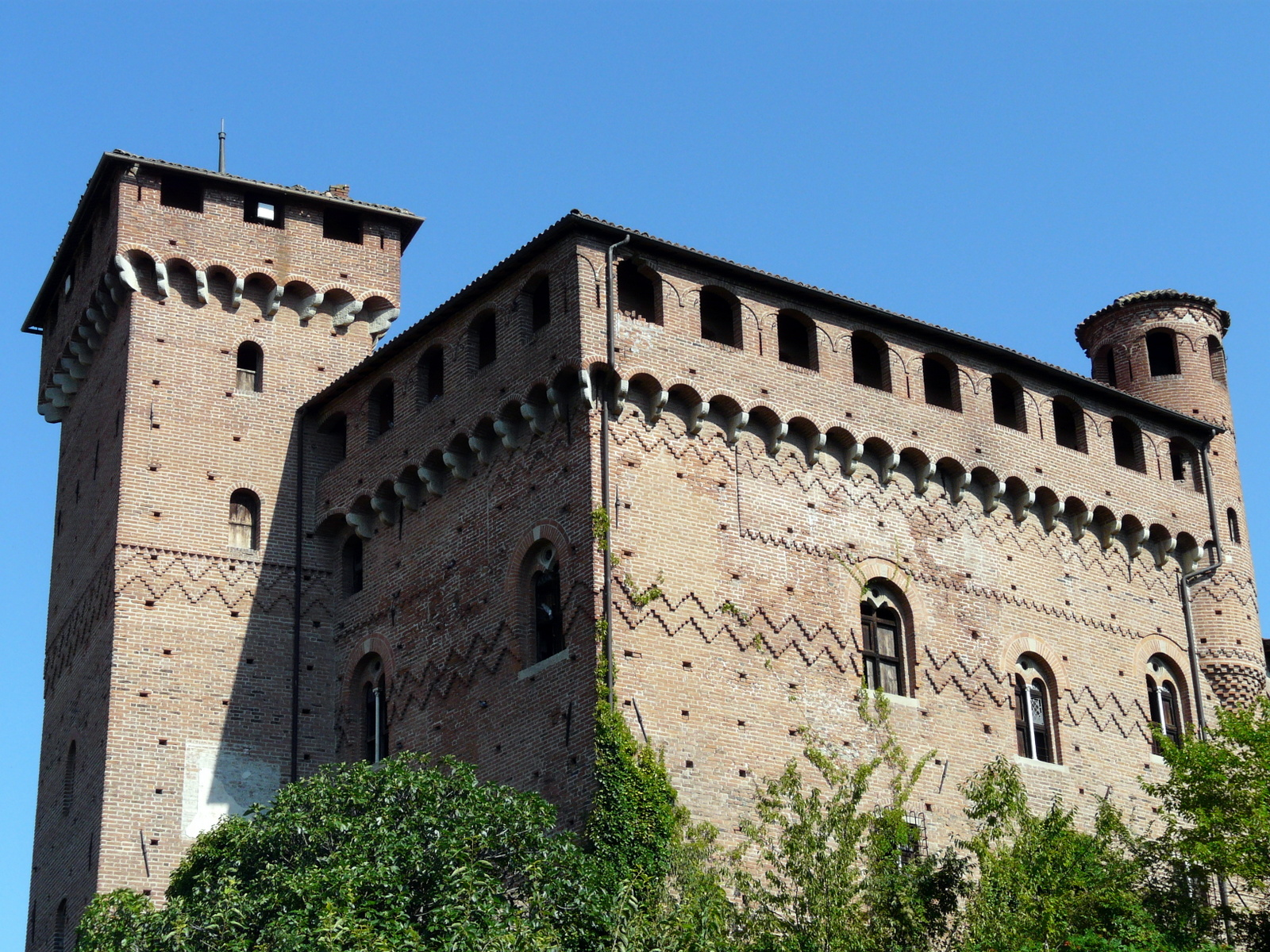 Castello di Francavilla Bisio, Piemonte, Italia